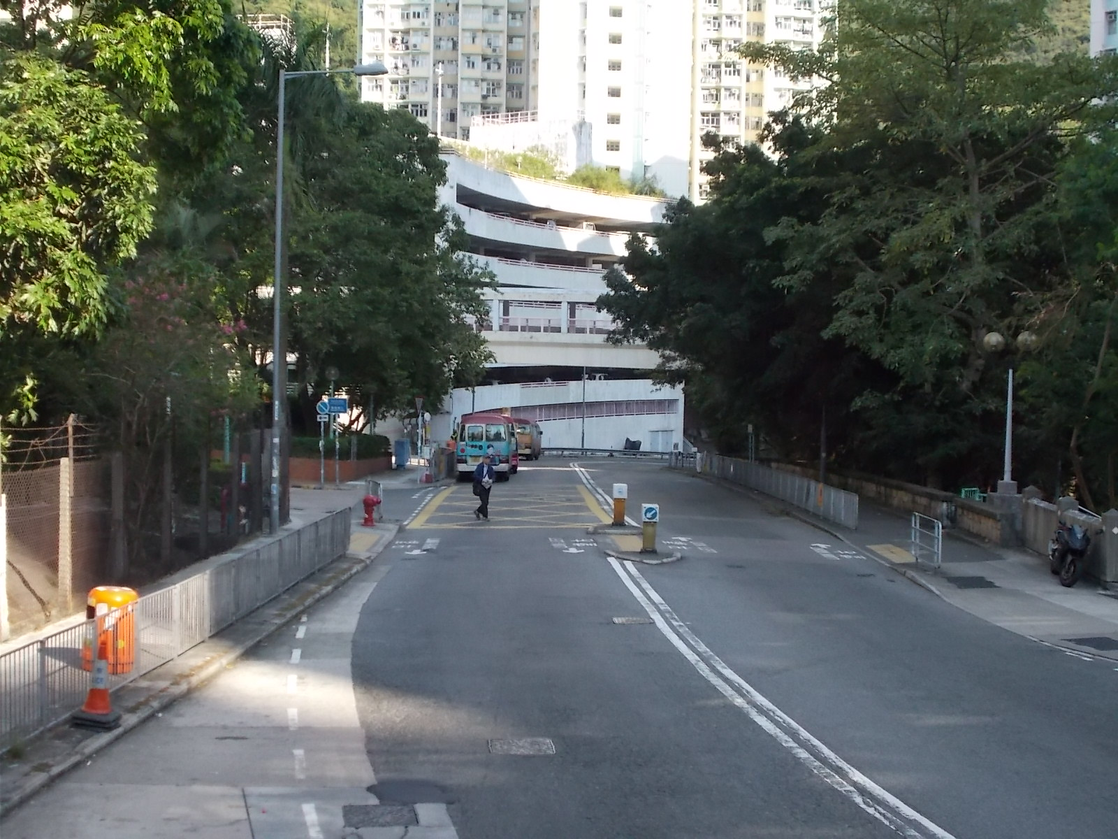 近高俊苑的高超道(2017年11月)